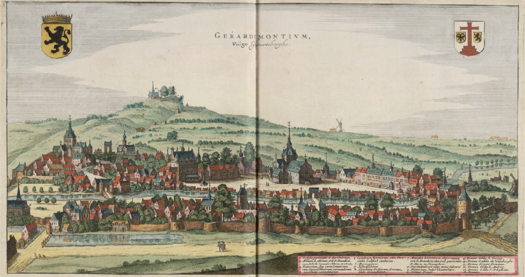 Geraardsbergen in de eerste helft van de 17e eeuw (afbeelding uit Flandria Illustrata - 1641)